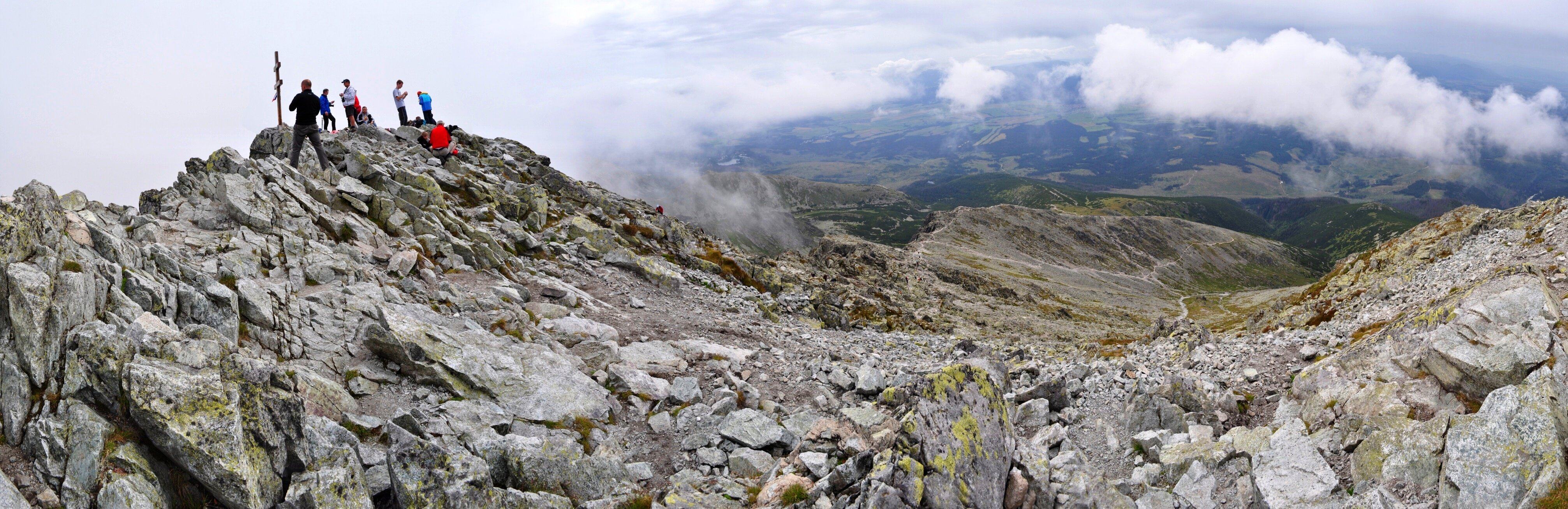 Na vrchole Kriváňa